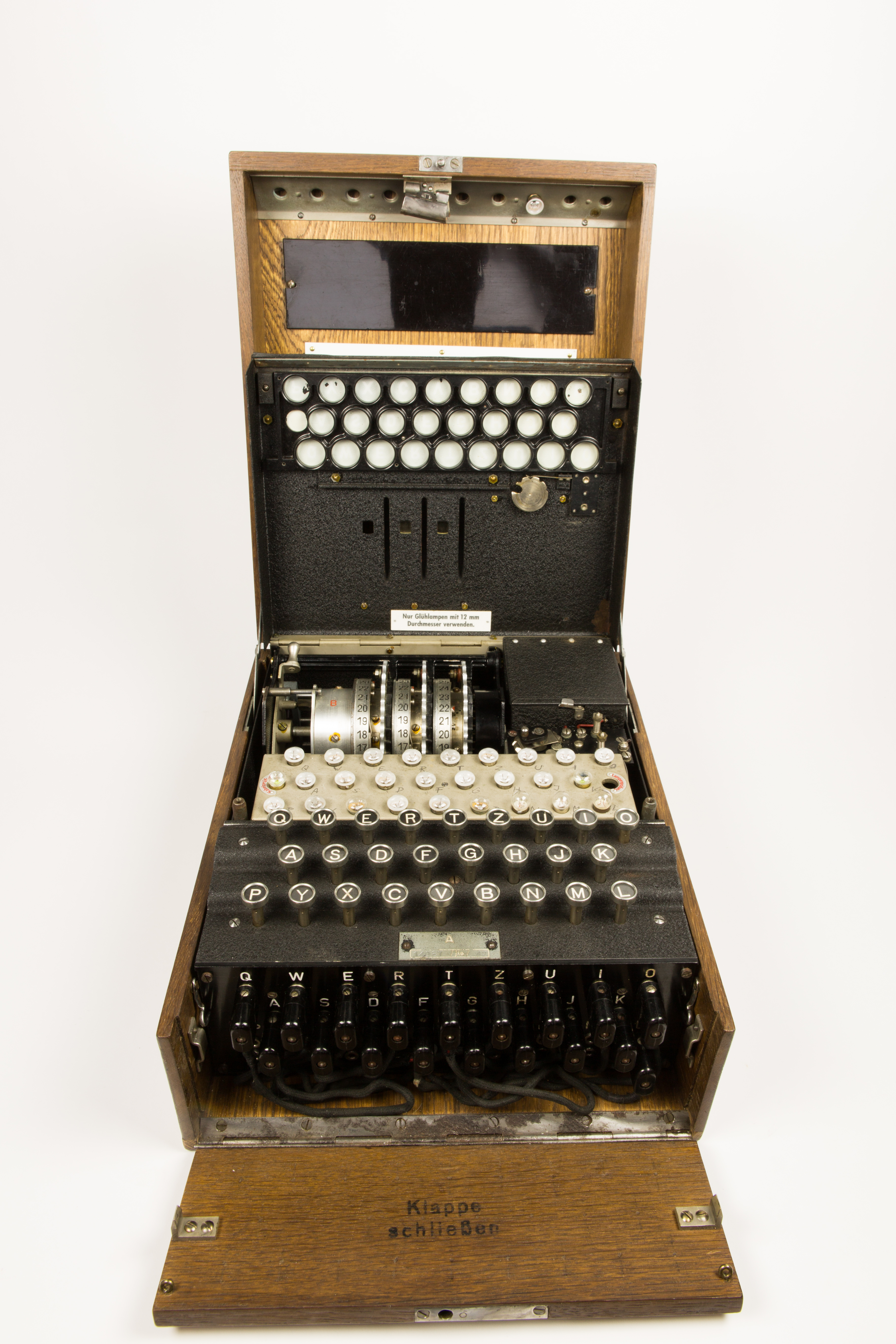 Machine Enigma (Allemagne)